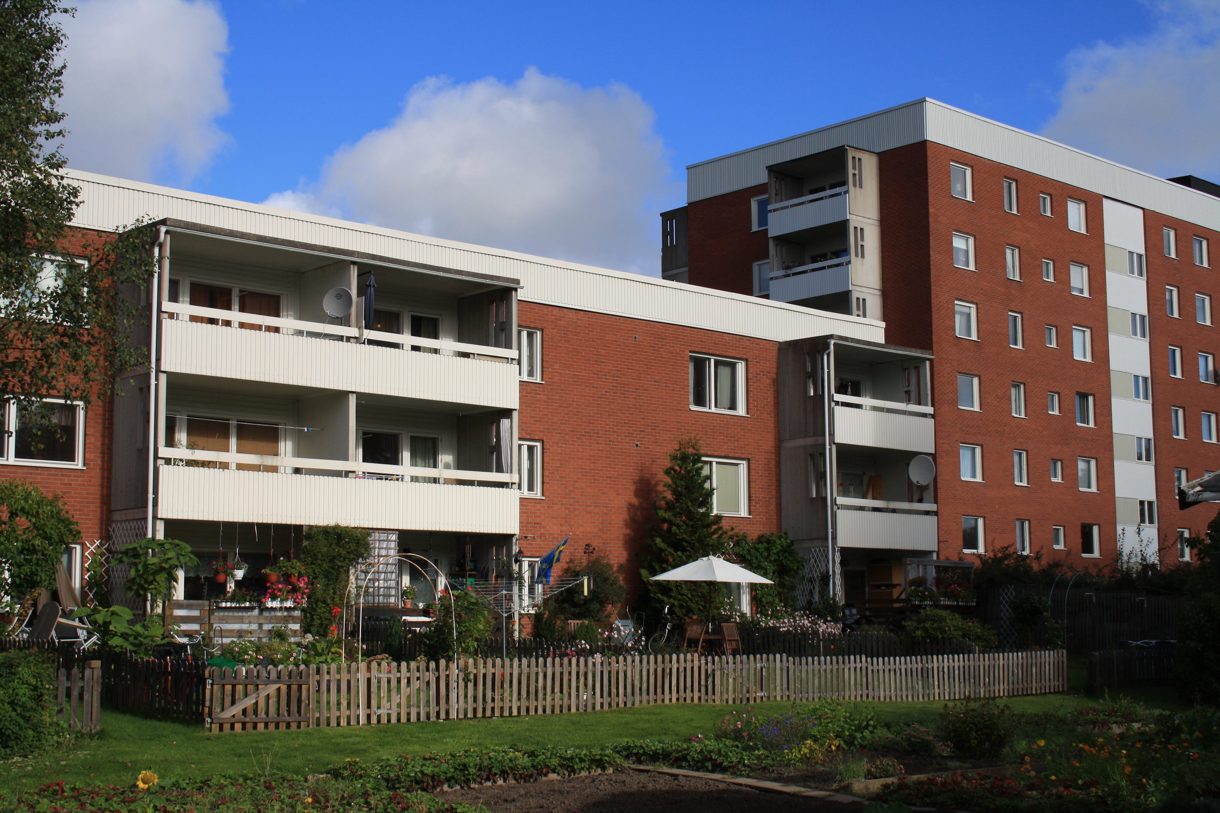 Bild på uteplatser i Backlura / Nickstahöjden